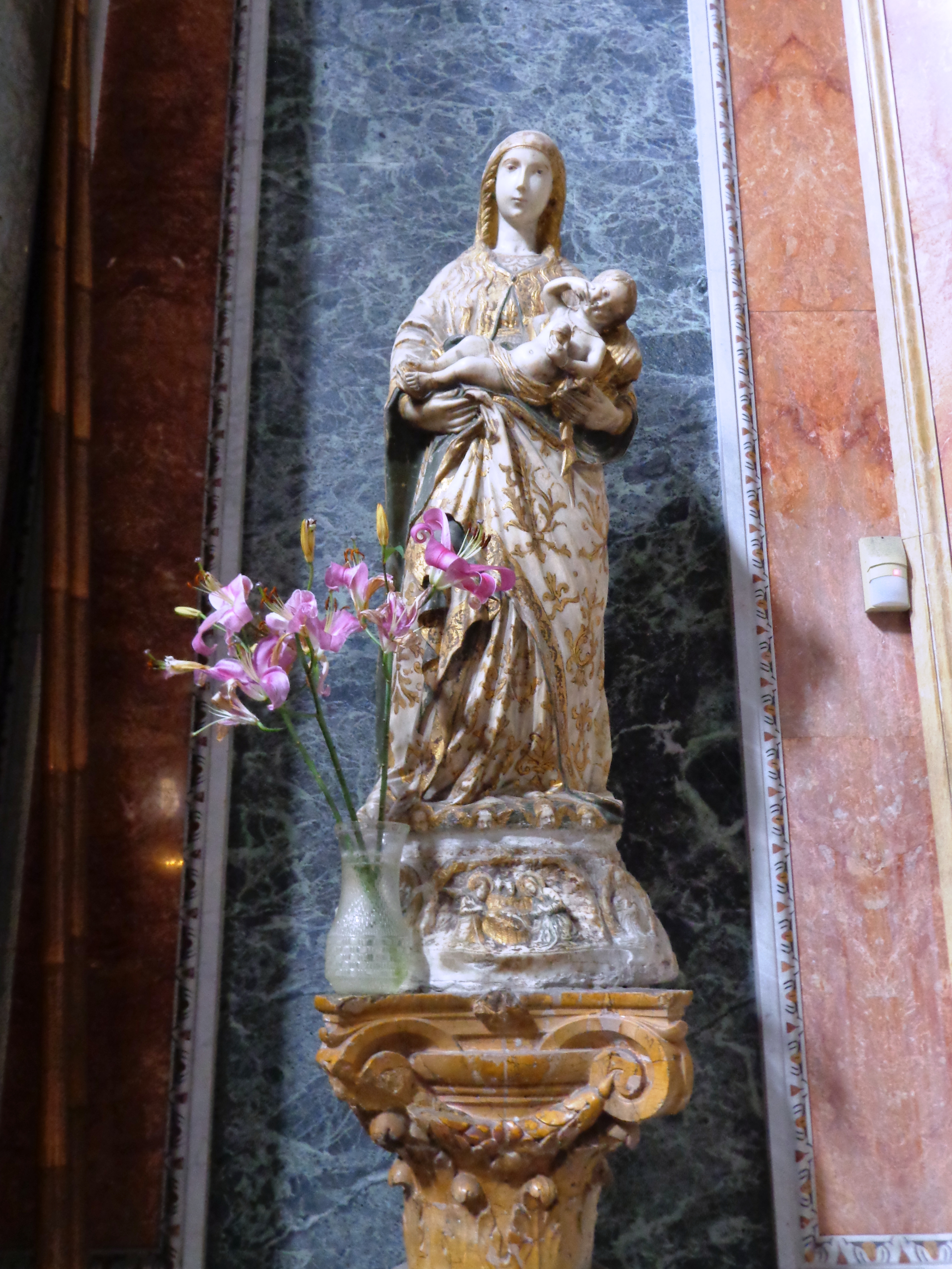 Teatini_Pa_01